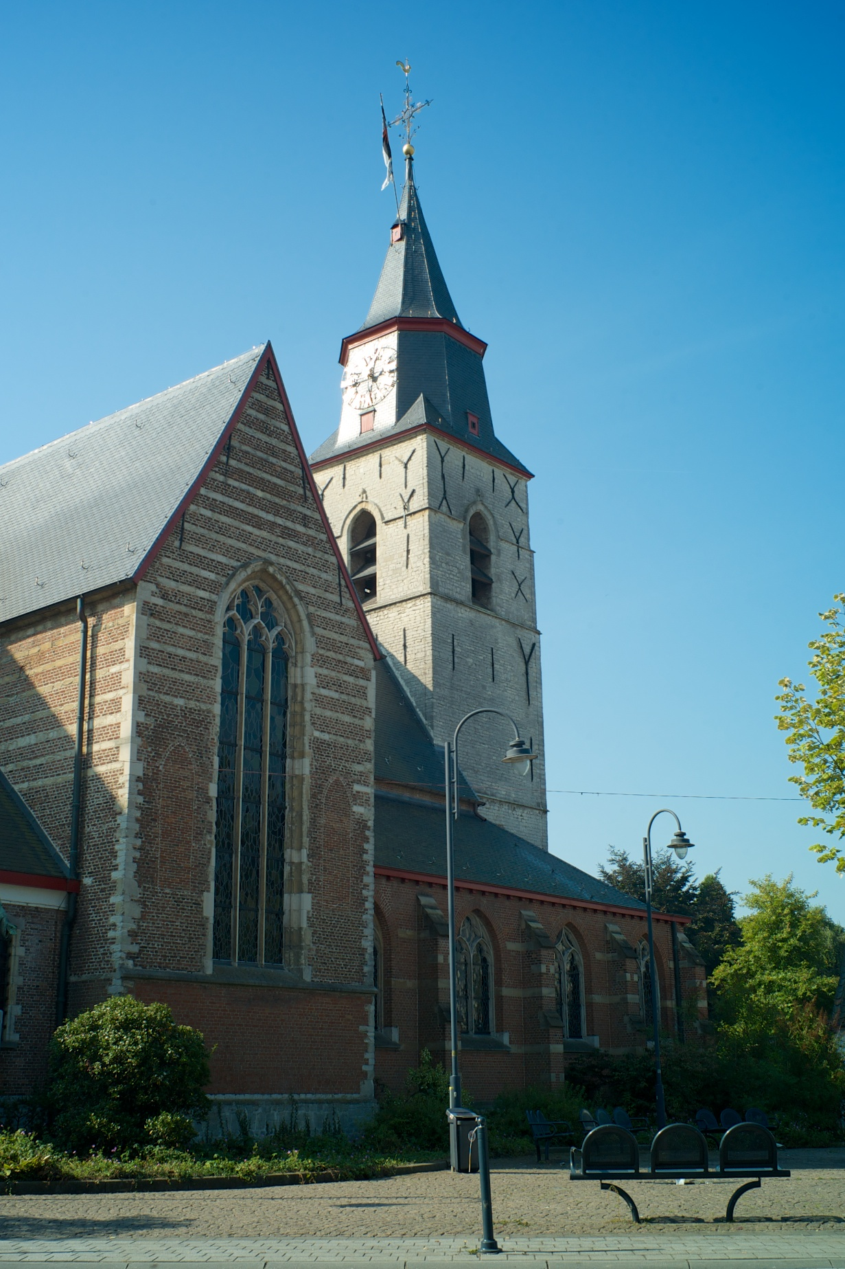 Kapel St.-Antonius de Eremijt. Georiënteerde grotendeels gotische kruiskerk uit XVI-XVII, met W.-toren uit XV en zijbeuken van 1888. Ingeplant tgov. toegangsdreef tot het z.g. "Hof ter Linden"; omringd door omhaagd terrein met struikgewas en bomen.